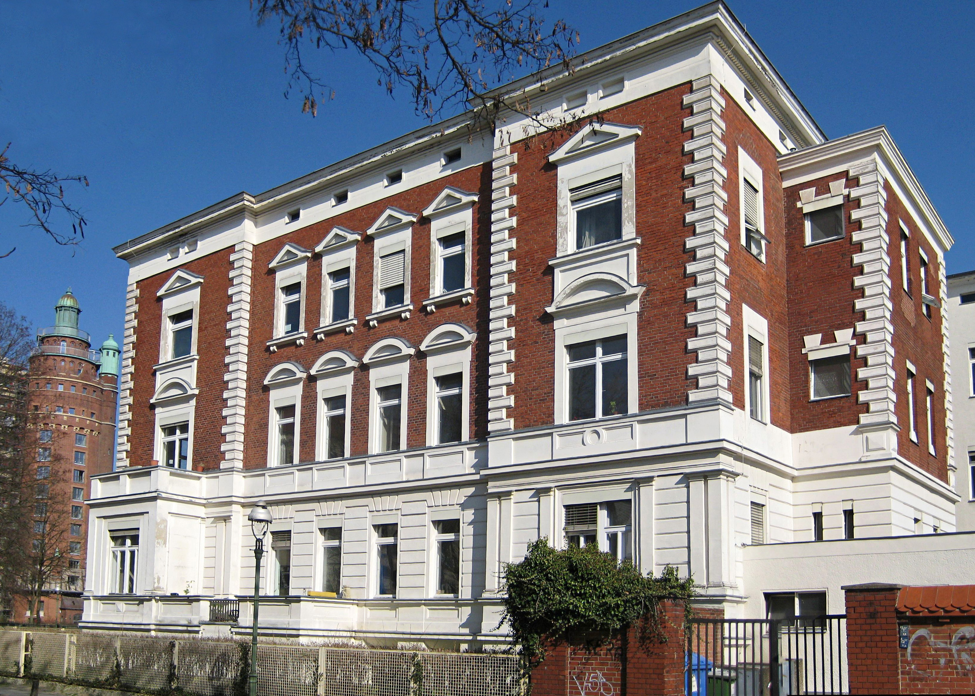 Nervenheilanstalt, Kirschallee